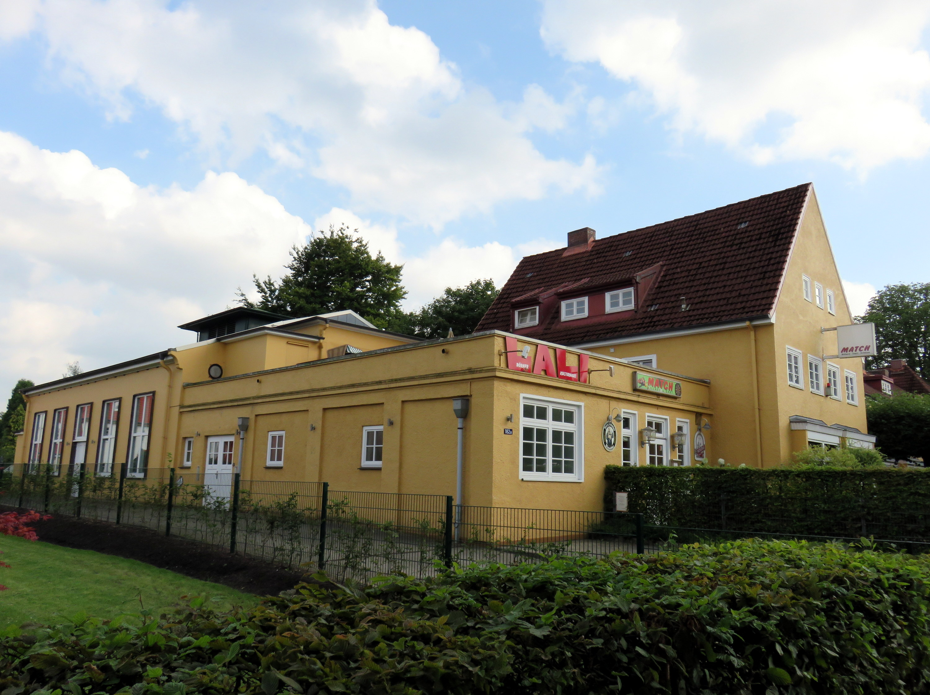 Ehemaliges Kino Tangstedter Landstraße 182a in Hamburg-Langenhorn, erbaut1933/1945. Rechts daneben Tangstedter Landstr. 182. This is a photograph of an architectural monument.